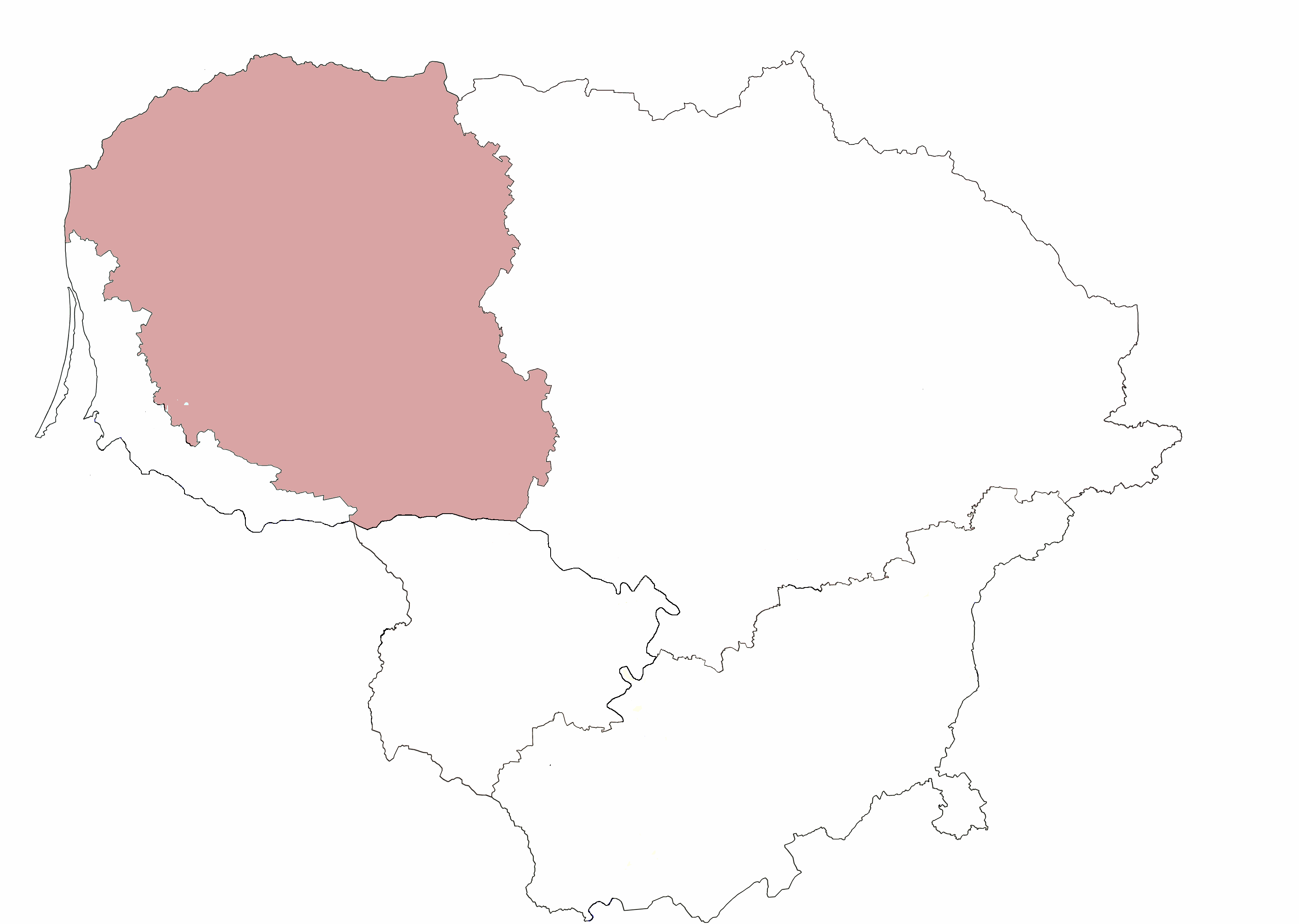 Etnograafilise Žemaitija ala Leedus